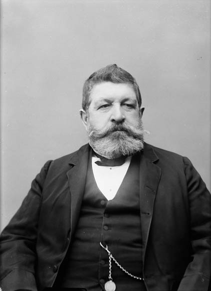 Hon. Alexander Walker Ogilvie, (Senator) b. May 7, 1829 - d. March 31, 1902